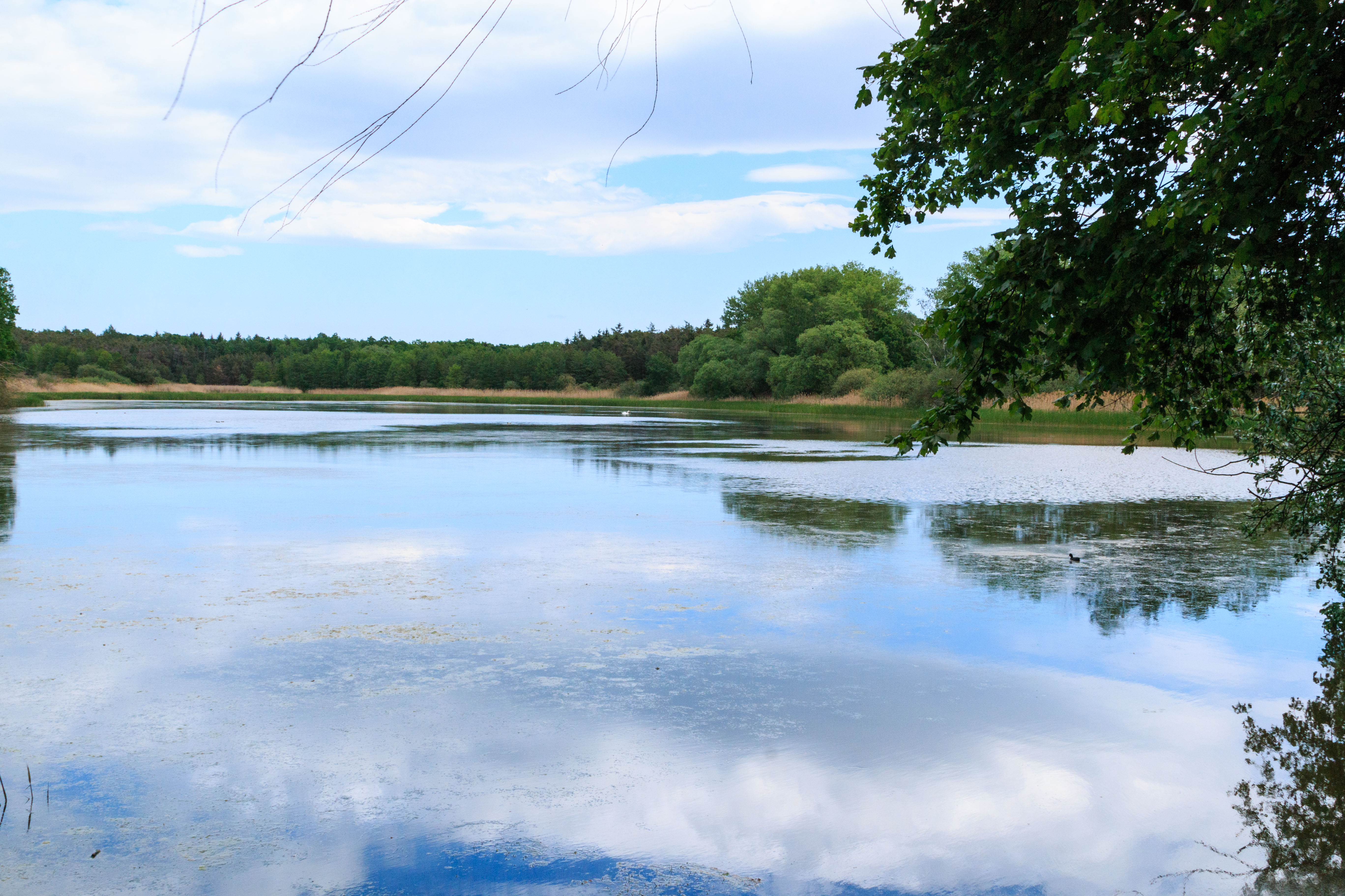 Rybník Mordýř v PR Žernov Project: Vodstvo.